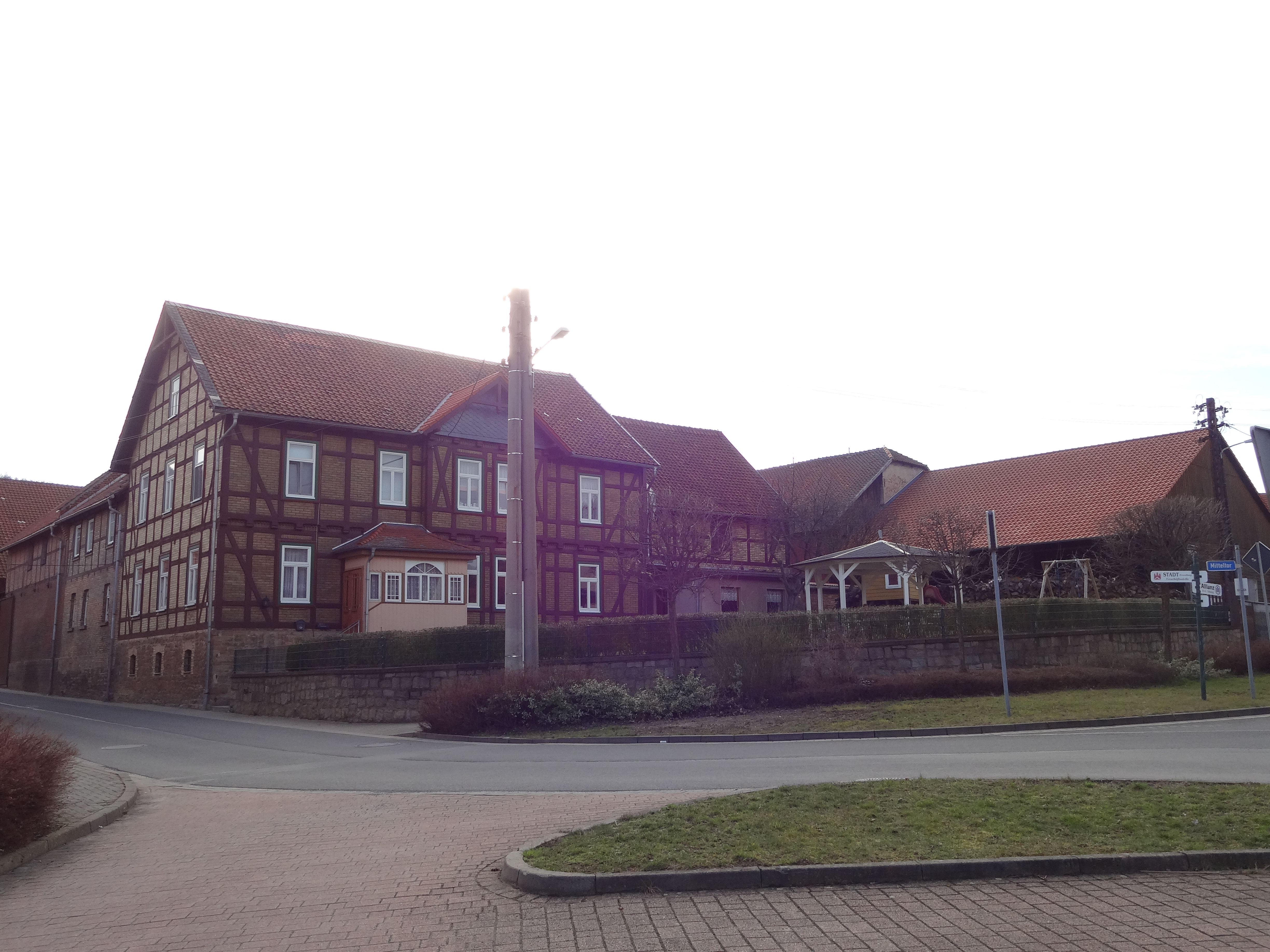 Denkmalgeschützter Bauernhof am Mitteltor 2 in Benzingerode (Ortsteil von Wernigerode)